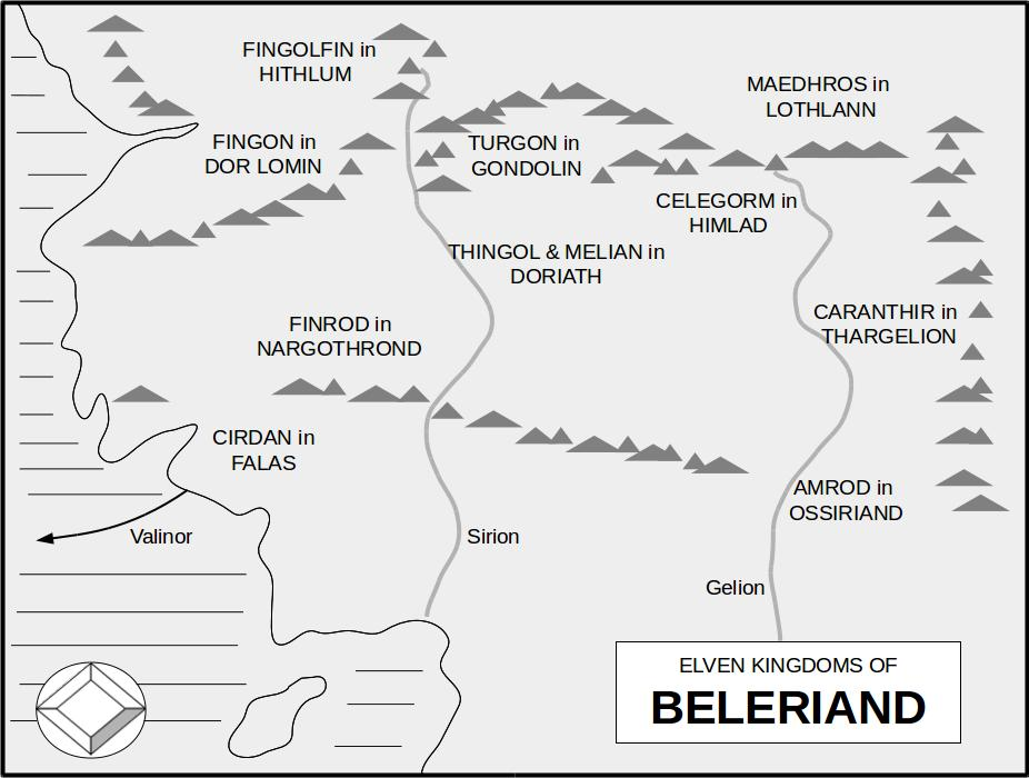 Mapa de los reinos elfos de Beleriand en la novela El Silmarillion de JRR Tolkien